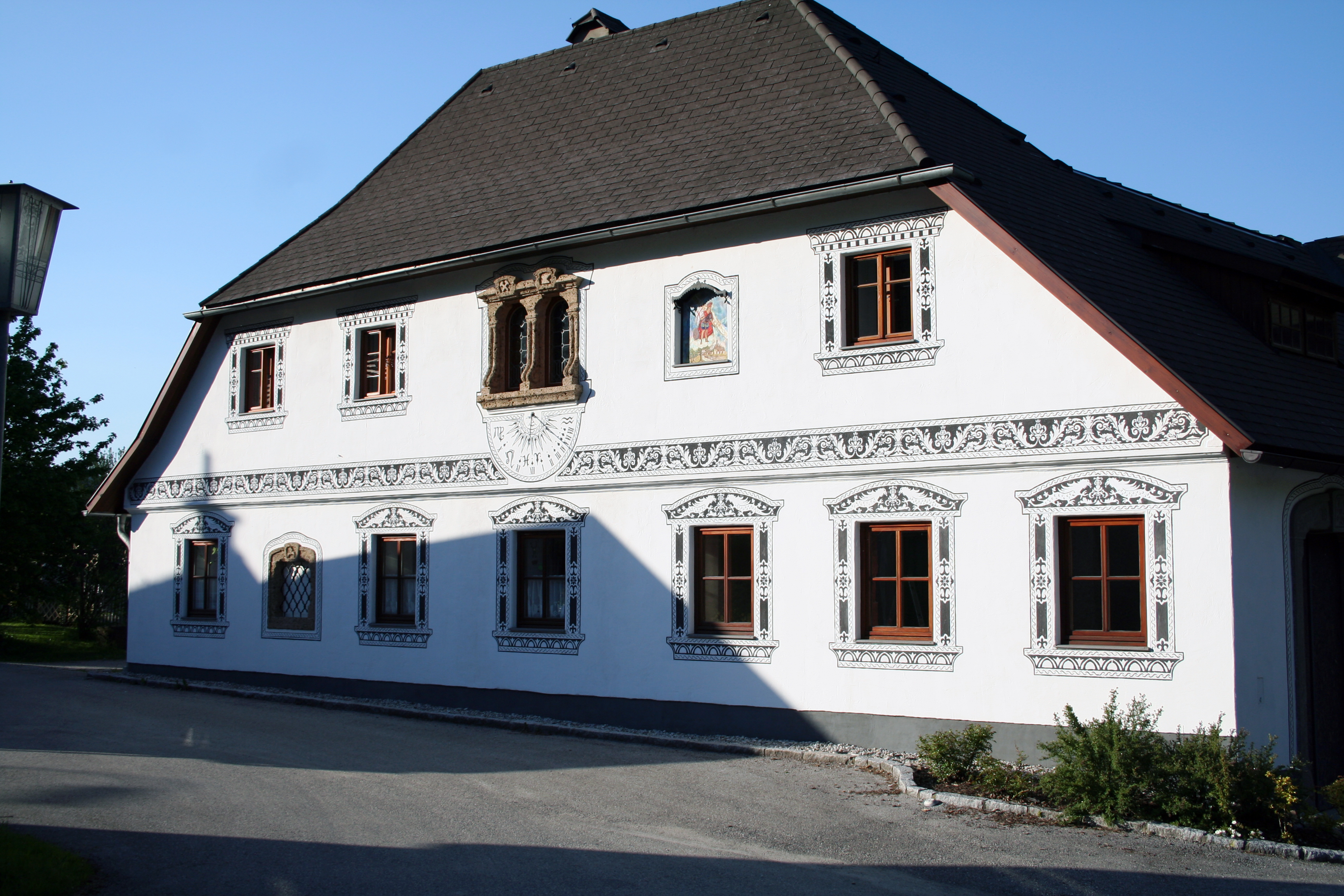 Altes Hammerherrenhaus in Gresten mit einem Sgraffito aus dem Jahre 2009/10 von Andreas Lengauer, Malermeister aus Gresten. [1]